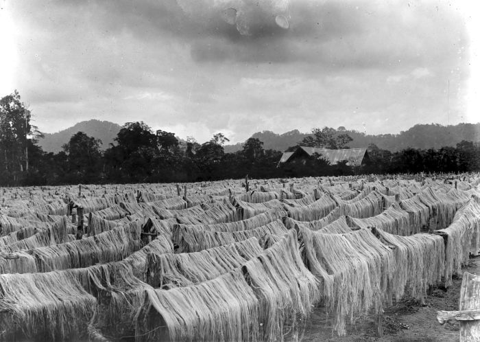 Negatief. Manilla-hennep (musa textilis), een vezelleverende soort bananenplant, hangt te drogen op onderneming Kali Baroe, Besoeki, Oost-Java